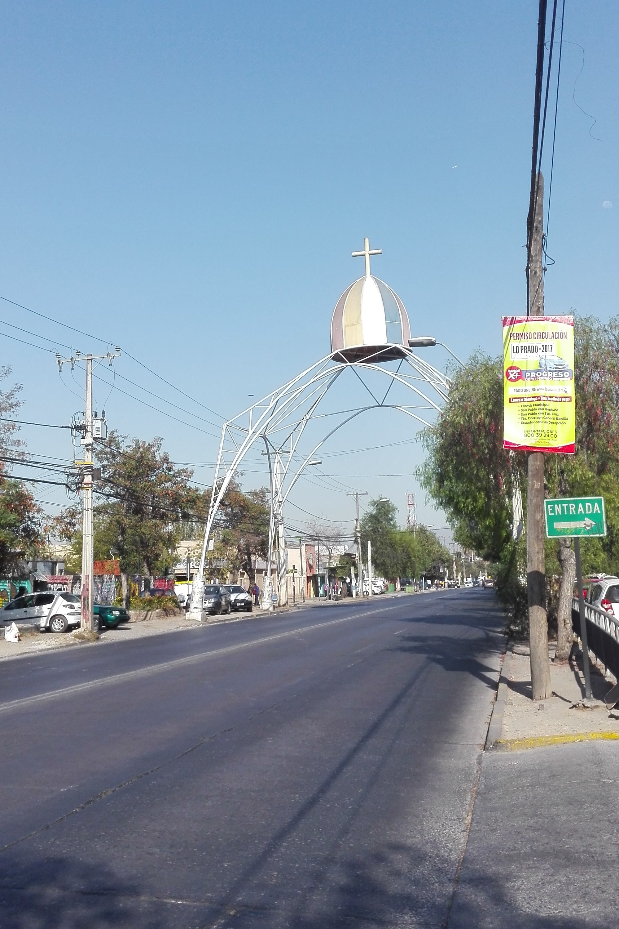 Arco en homenaje al papa Juan Pablo II, construido por su visita a Chile en 1987. Ubicado en la avenida San Pablo, Lo Prado, Santiago.